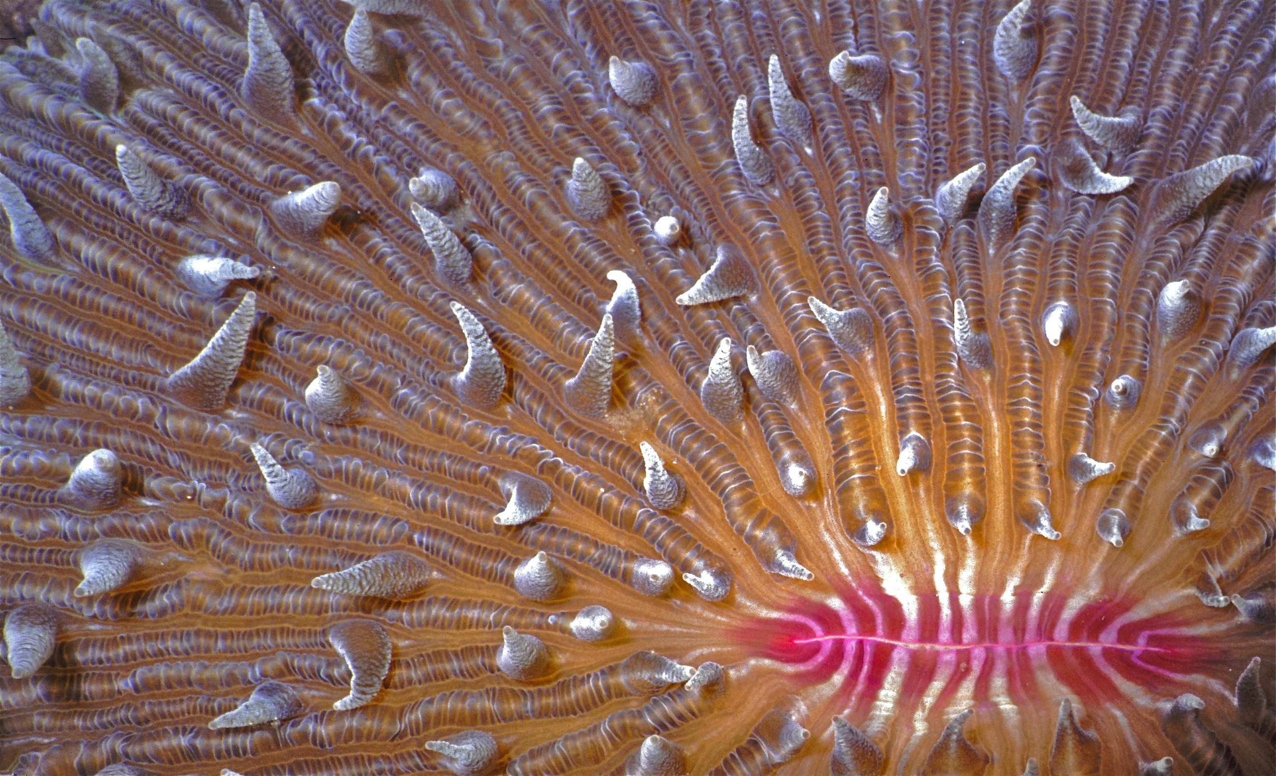 Lembeh Strait, Sulawesi, INDONESIA